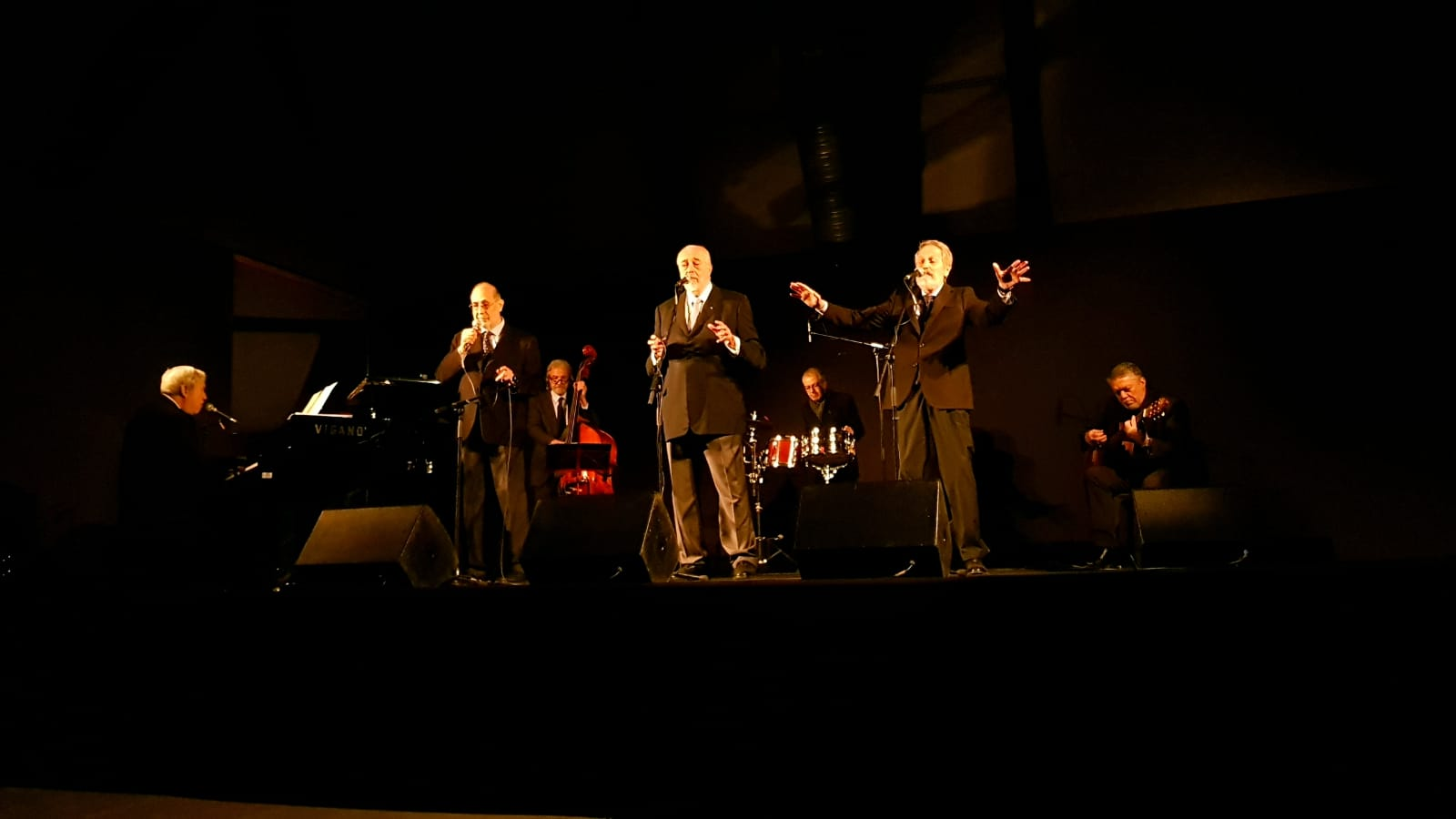 i Mnogaja Leta in concerto, Mariano Comense aprile 2019